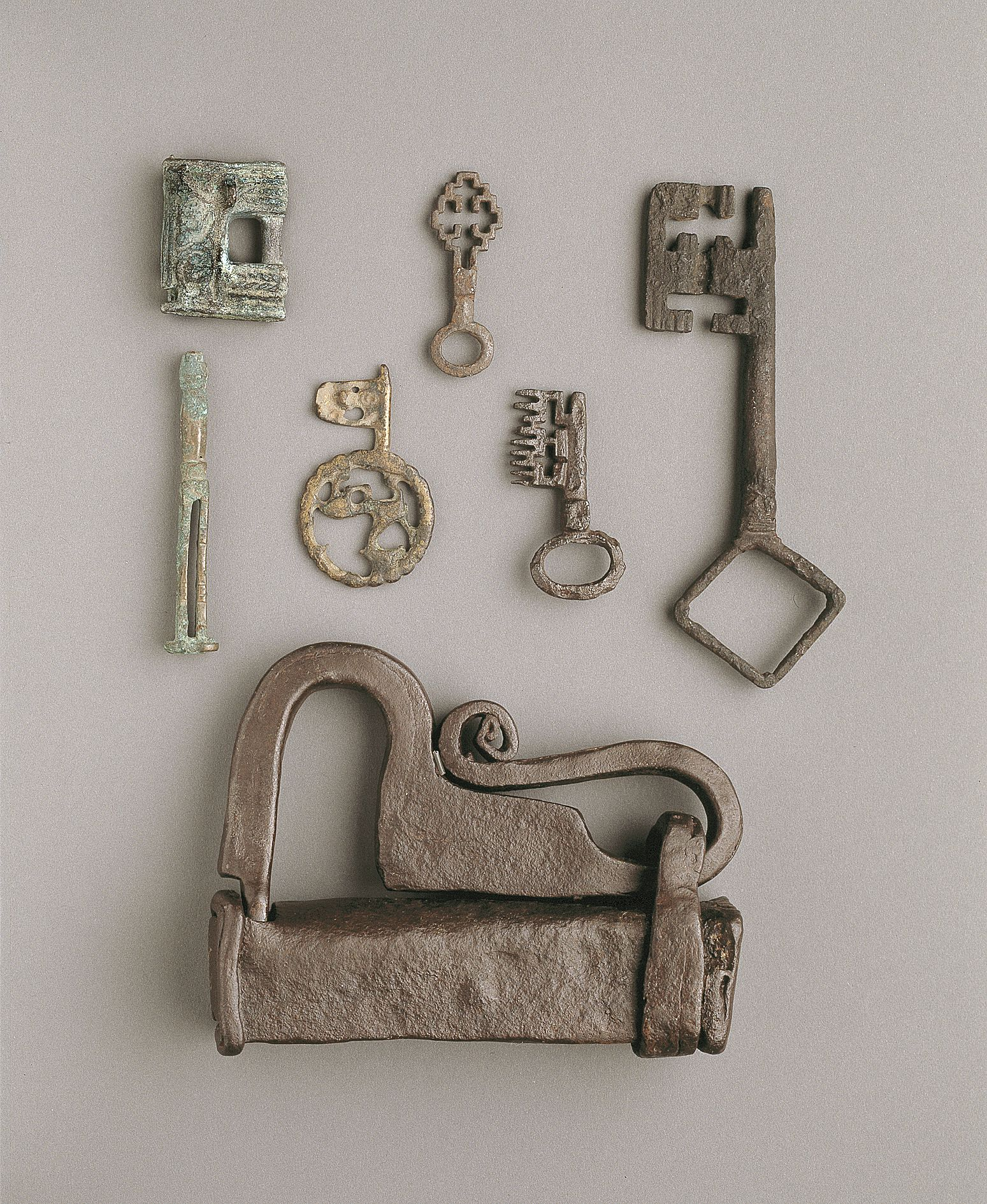 Eksempler på boltlåse og nøgler.